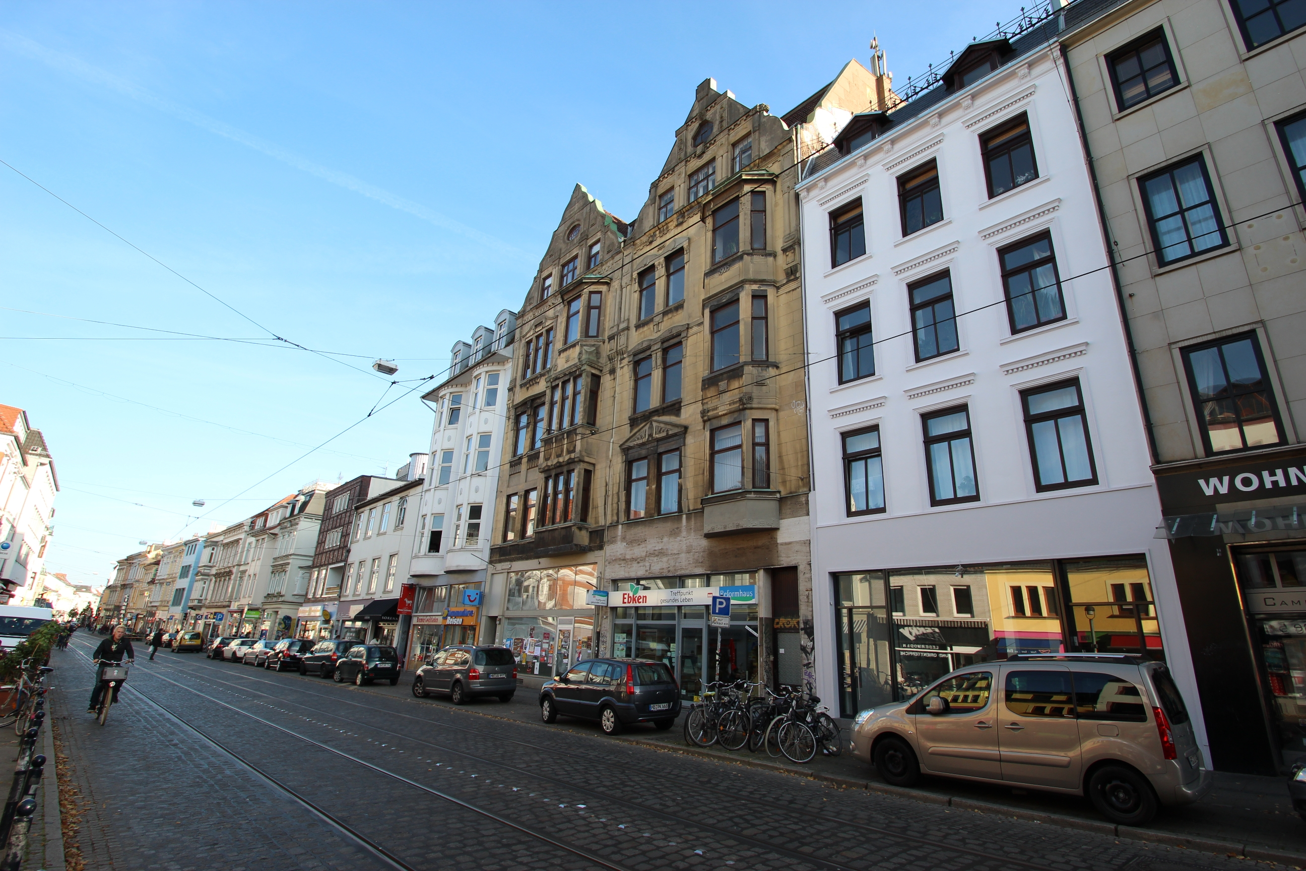 Wohn- und Geschäftshäuser in Bremen, Ostertorsteinweg 86–90ADie Denkmalgruppe ist ein geschütztes Kulturdenkmal in der Freien Hansestadt Bremen, mit der Nr. 1437 beim Landesamt für Denkmalpflege registriert.